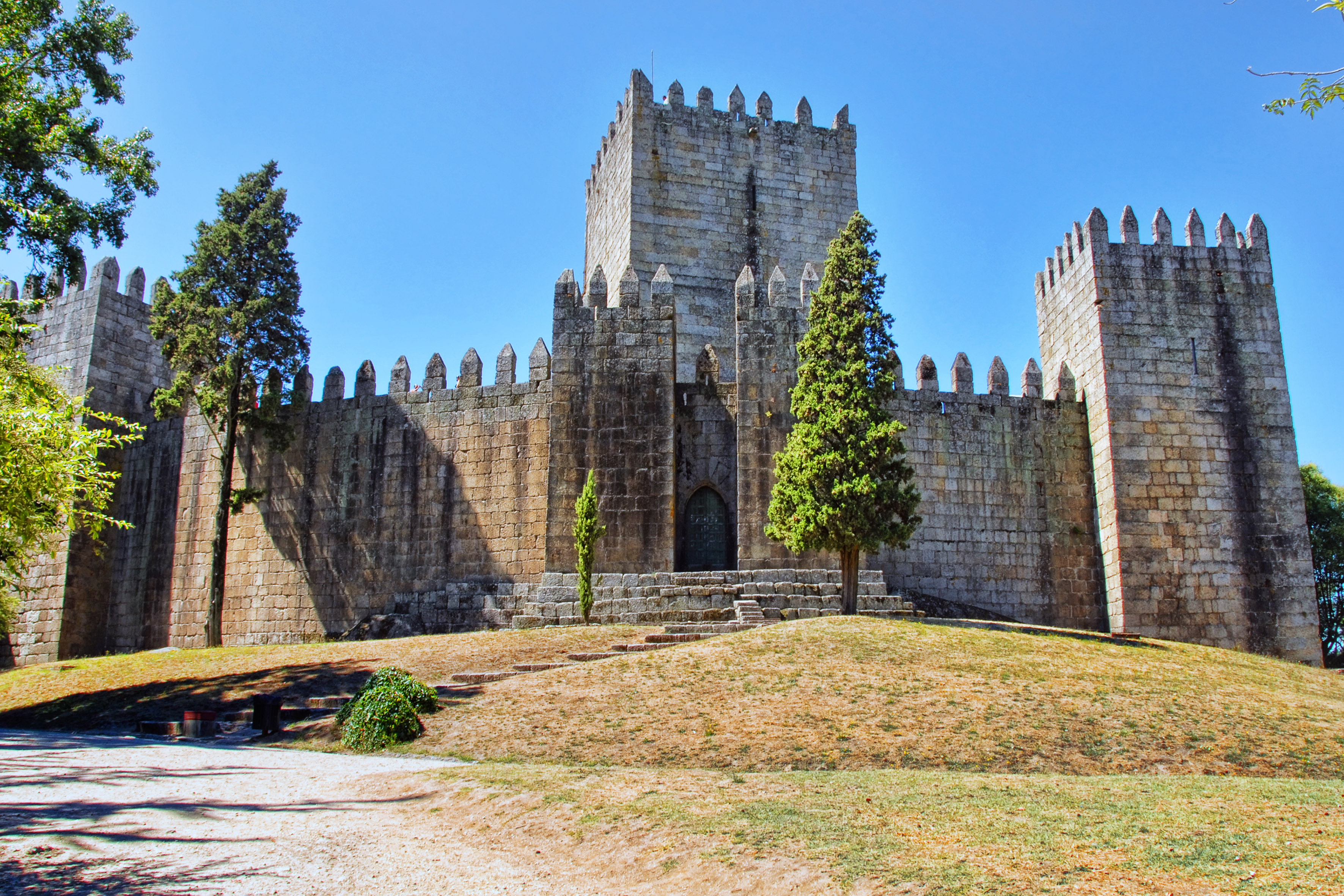 Guimarães - Castelo de Guimarães This file was uploaded for Wiki Loves Monuments in Portugal with the unique identifier 70511.